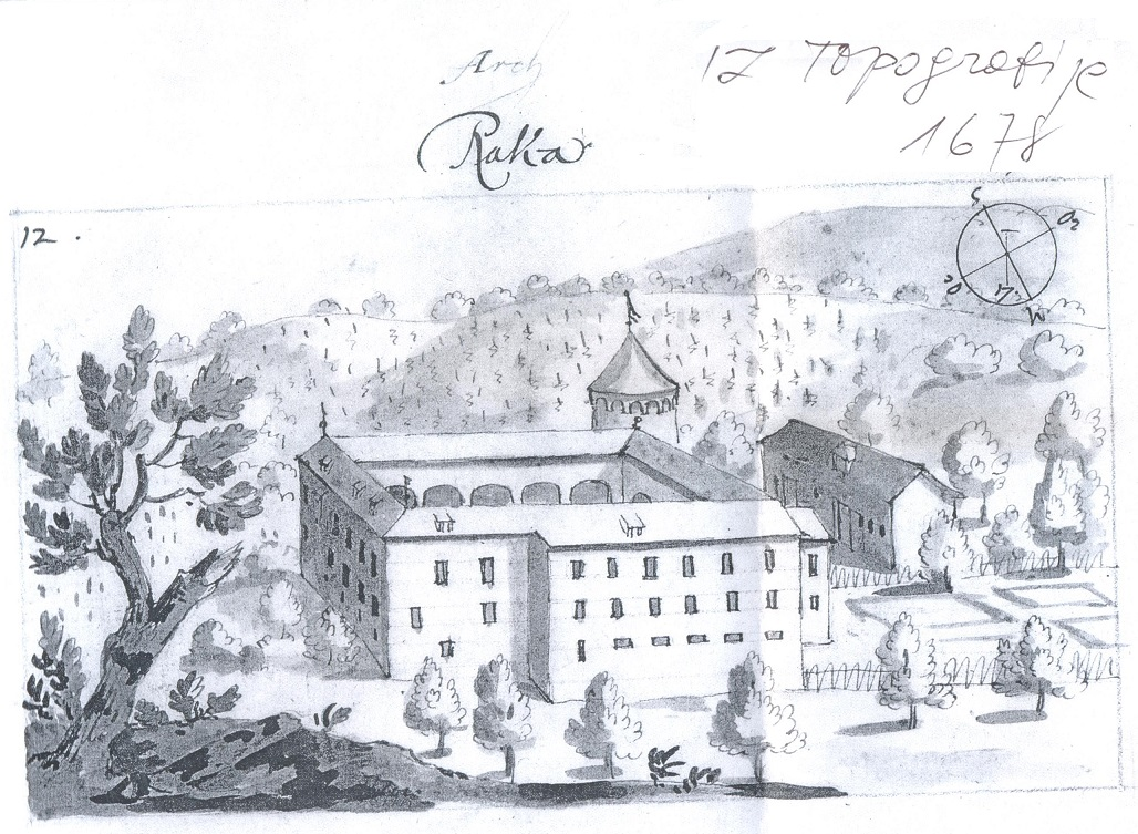 Grad Raka topografija